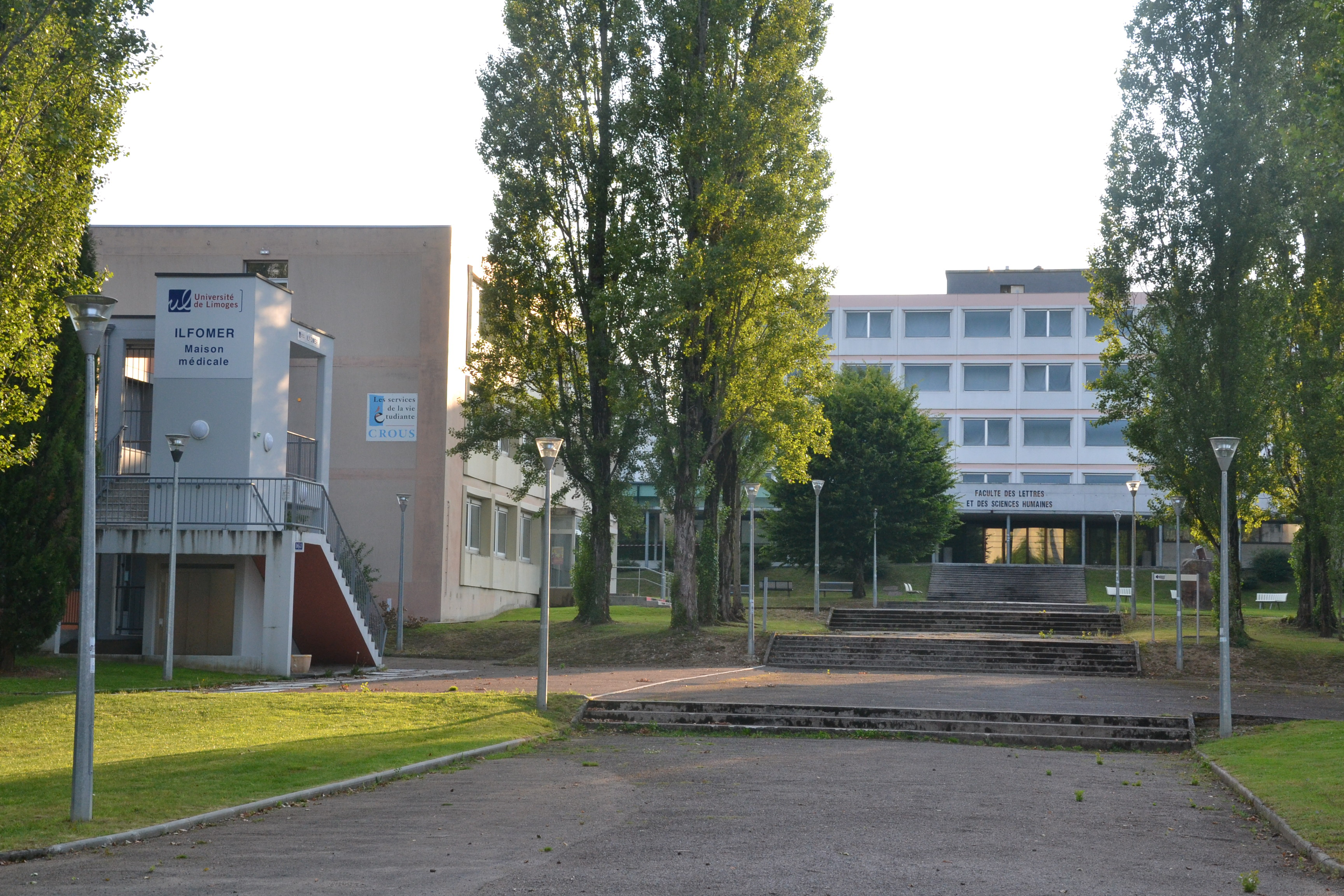 Faculté de lettres et sciences humaines de l'Université de Limoges (Haute-Vienne, France).